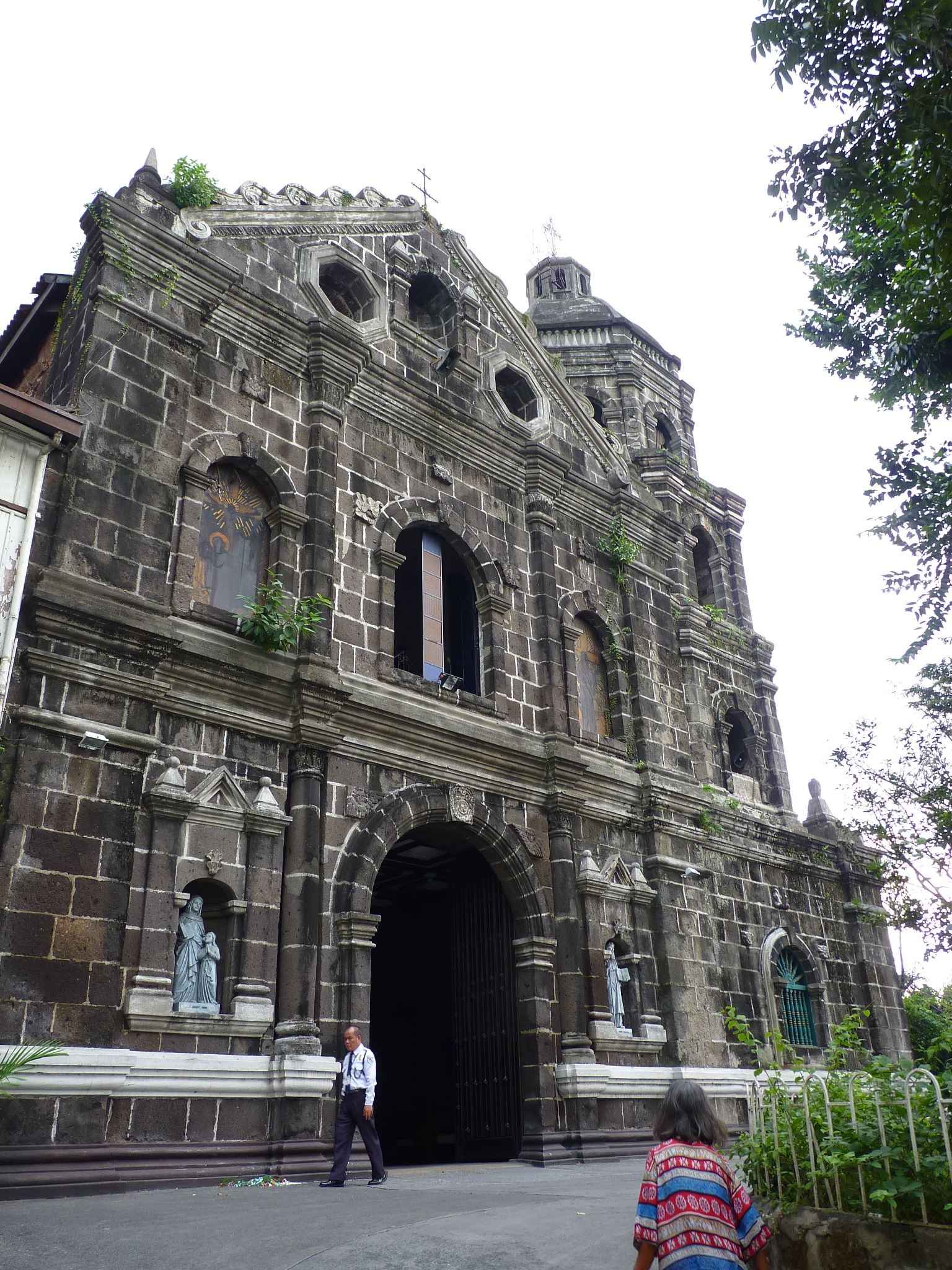 Santa Ana Church in Manila, Philippines